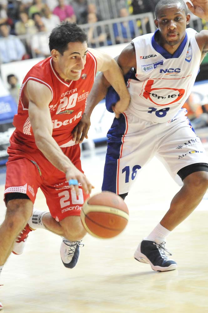 I cestisti Rok Stipčević (sx) e Jonathan Tabu (dx)